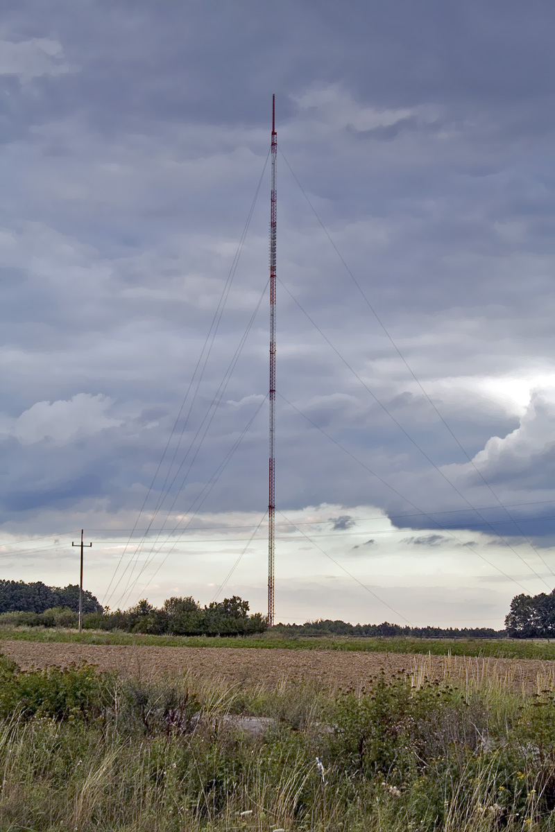 Wichow - TV Tower